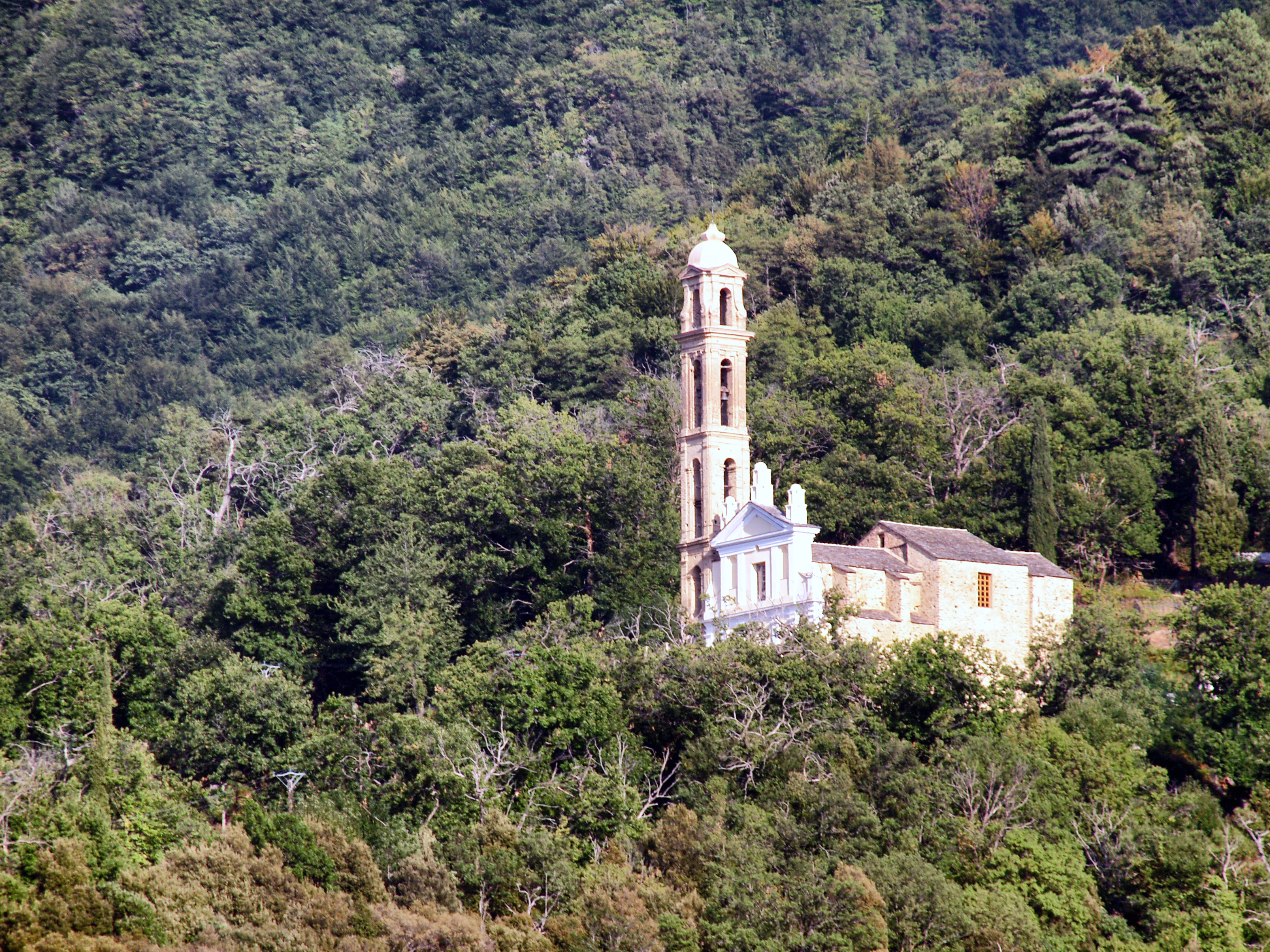 Sant'Andréa-di-Bozio (Haute-Corse) - L'église paroissiale Saint-André dite « Cathédrale du Bozio », isolée dans la chataîgneraie.